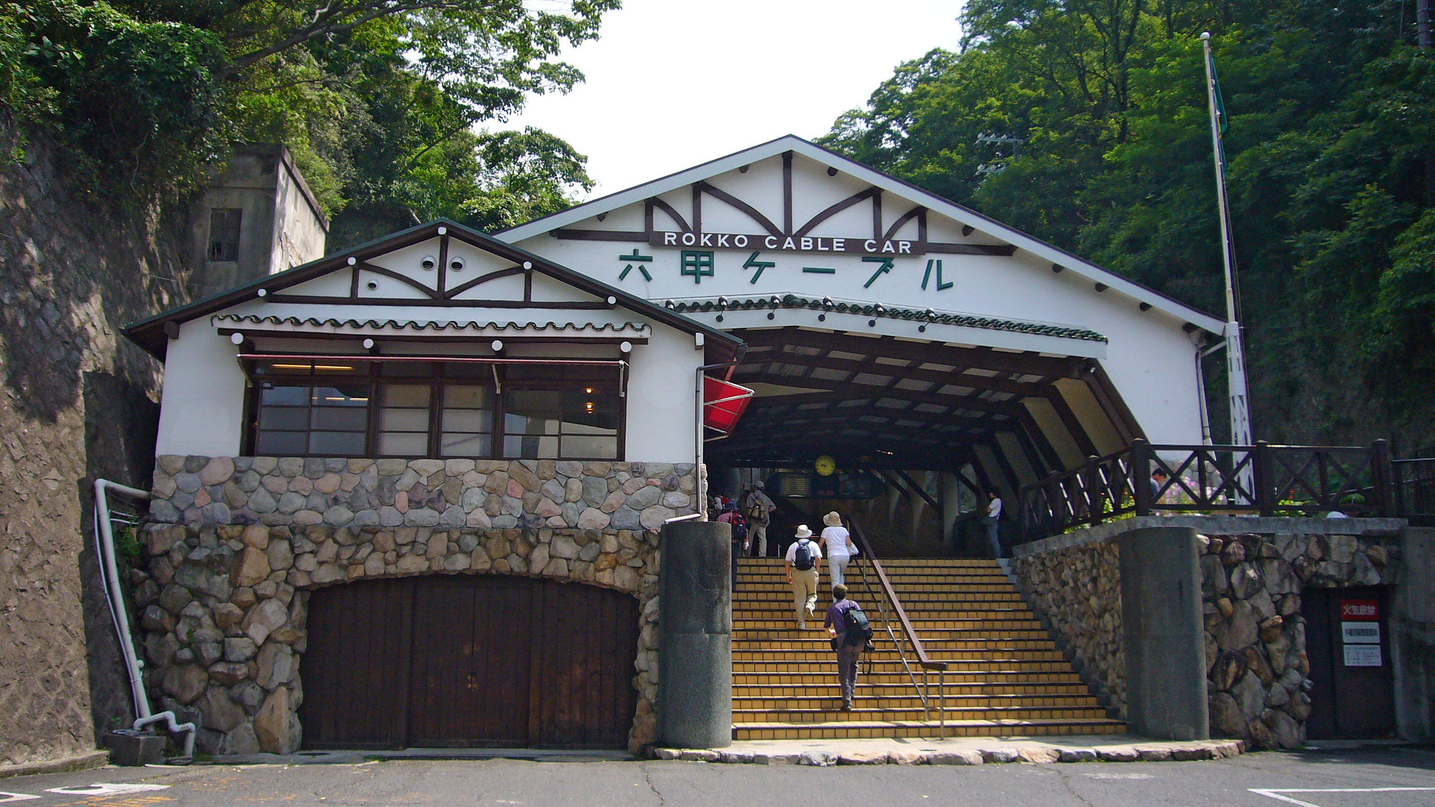 Rokko Cablecar in Kobe, Japan